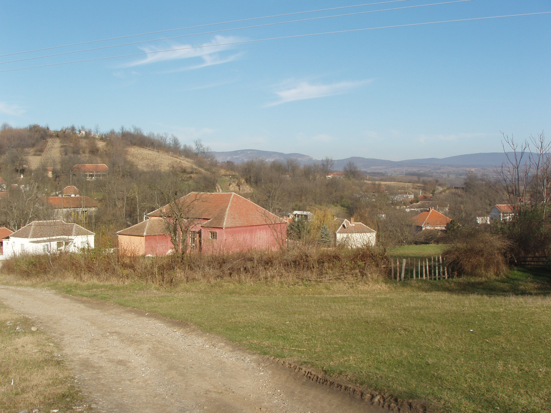 Стари Брачин - Stari Bračin